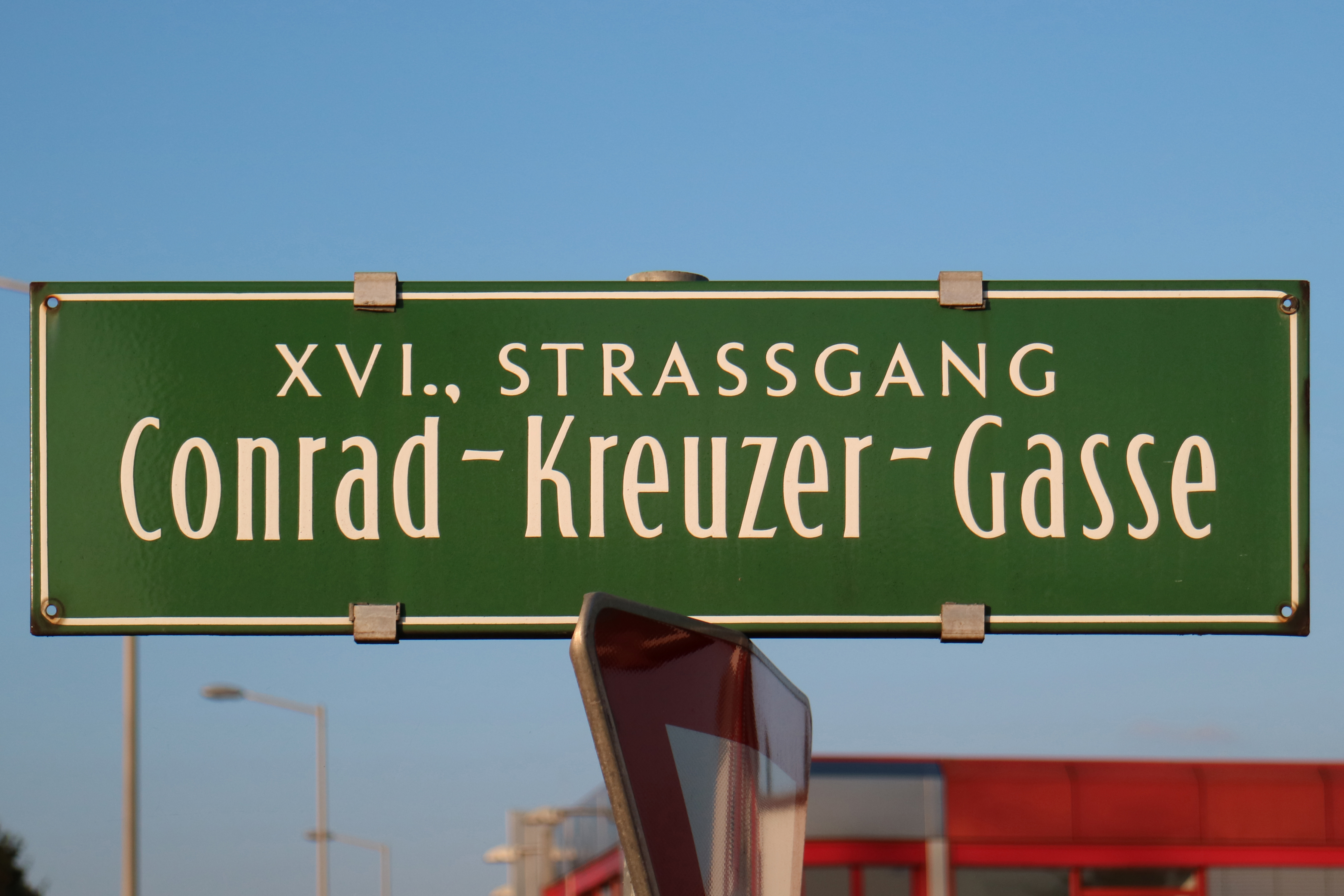 Straßenschild der Conrad-Kreuzer-Gasse in Graz-Straßgang